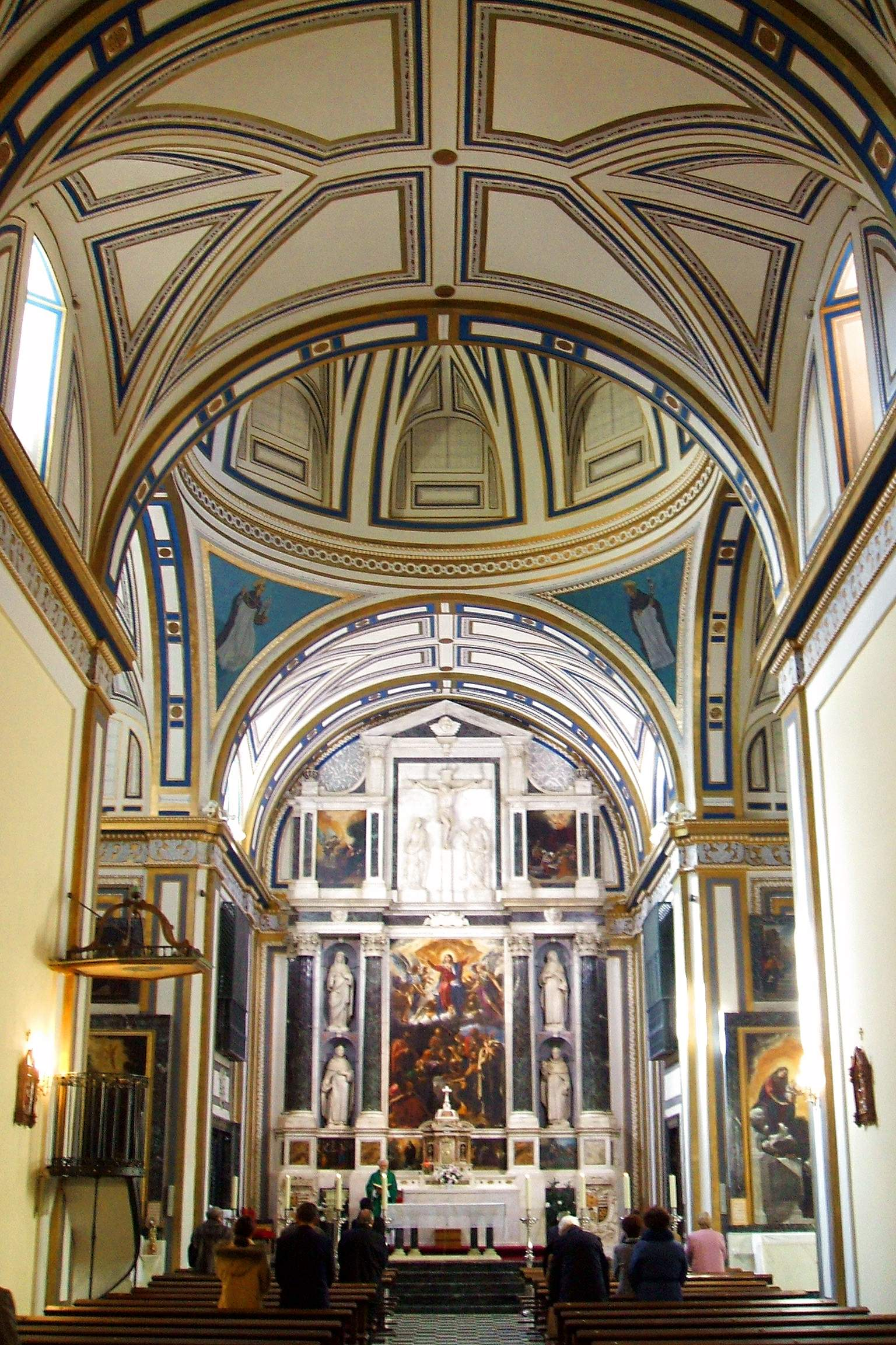 Convento de Porta Coeli (MM Dominicas), en Valladolid